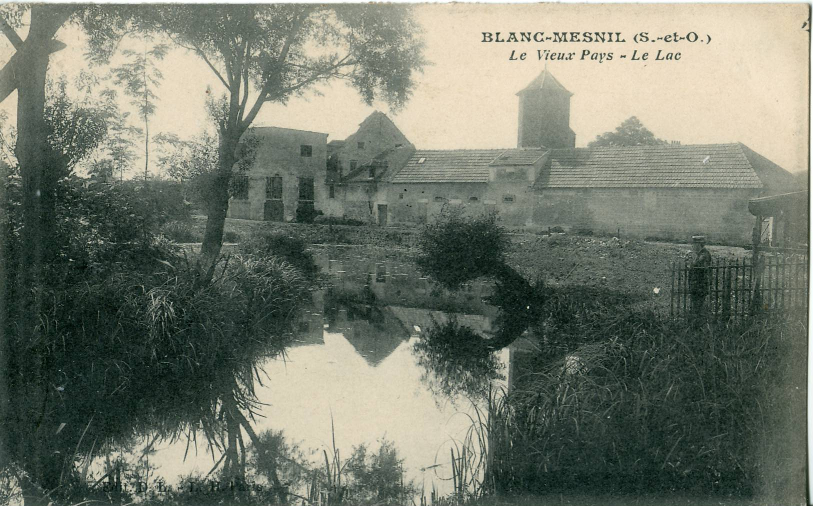 Carte postale éditée par DL - LH BLANC MESNIL (Seine-Saint-Denis - France) : Le Vieux Pays - Le Lac.